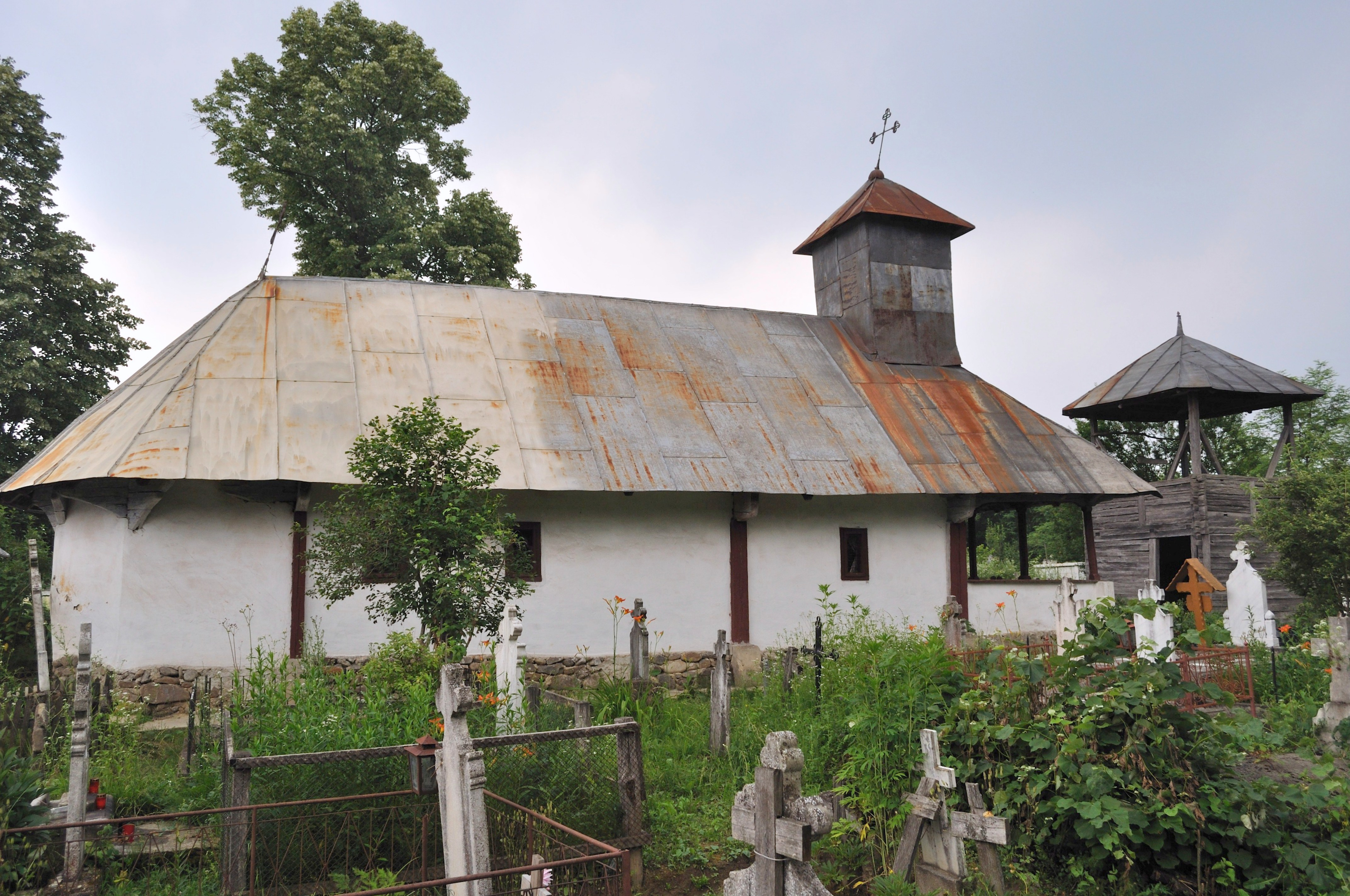 Biserica de lemn „Cuvioasa Paraschiva” din Ciuperceni, județul Gorj